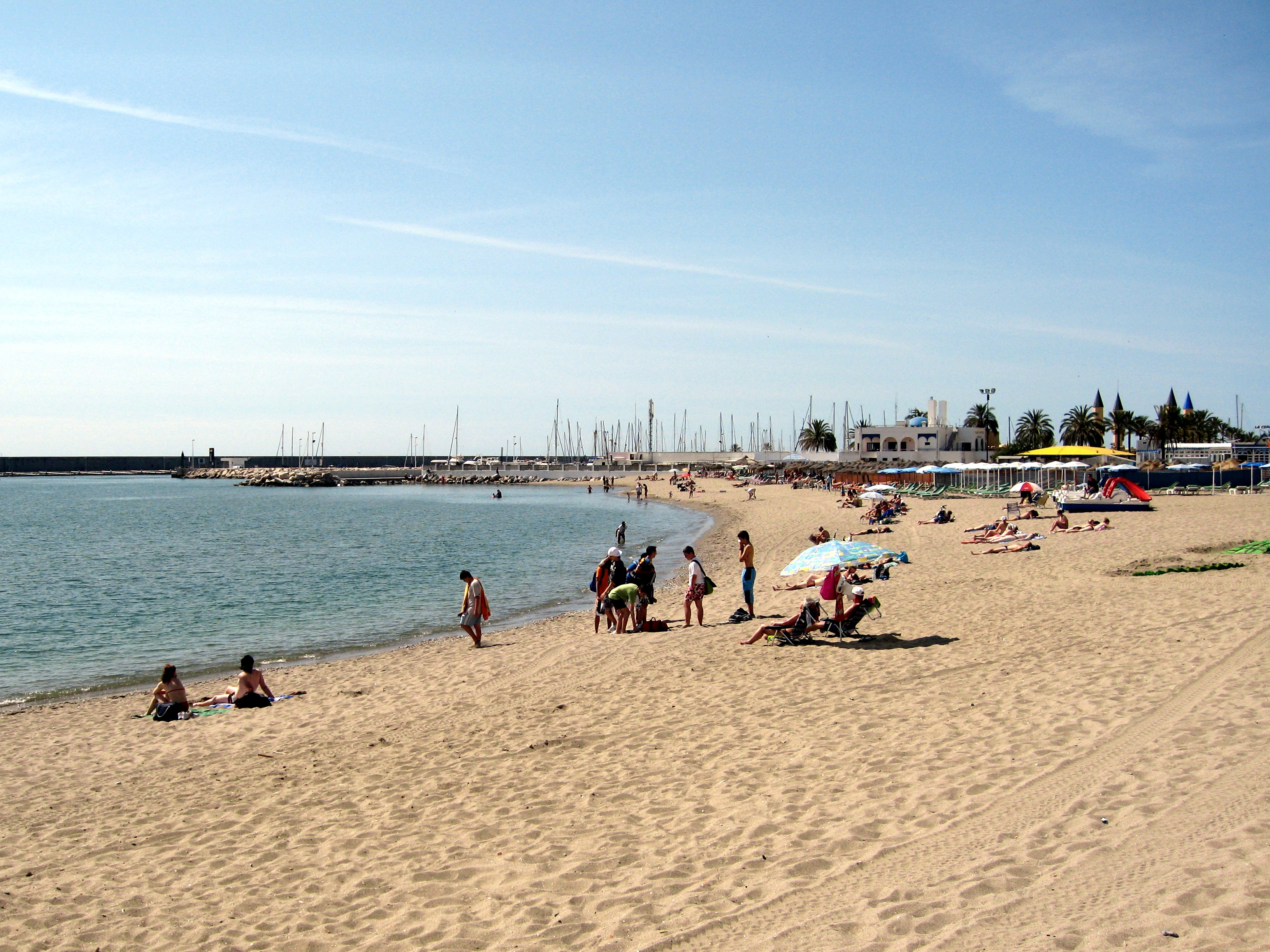 Strand von San Francisco / Playa de San Francisco, Fuengirola, Provinz Málaga, Andalusien, Spanien